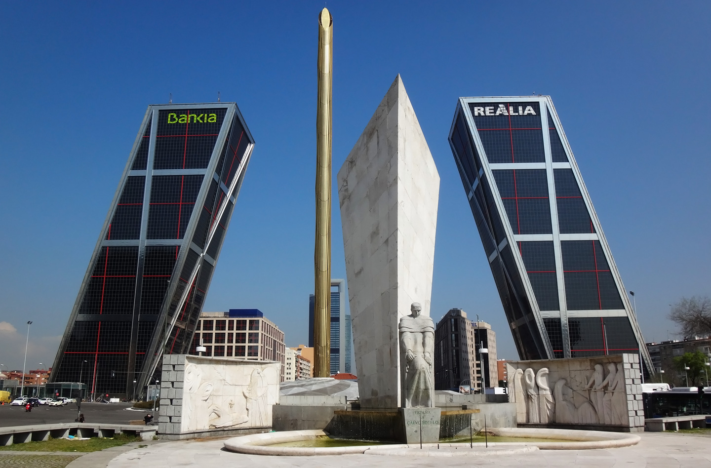 Площадь Европы